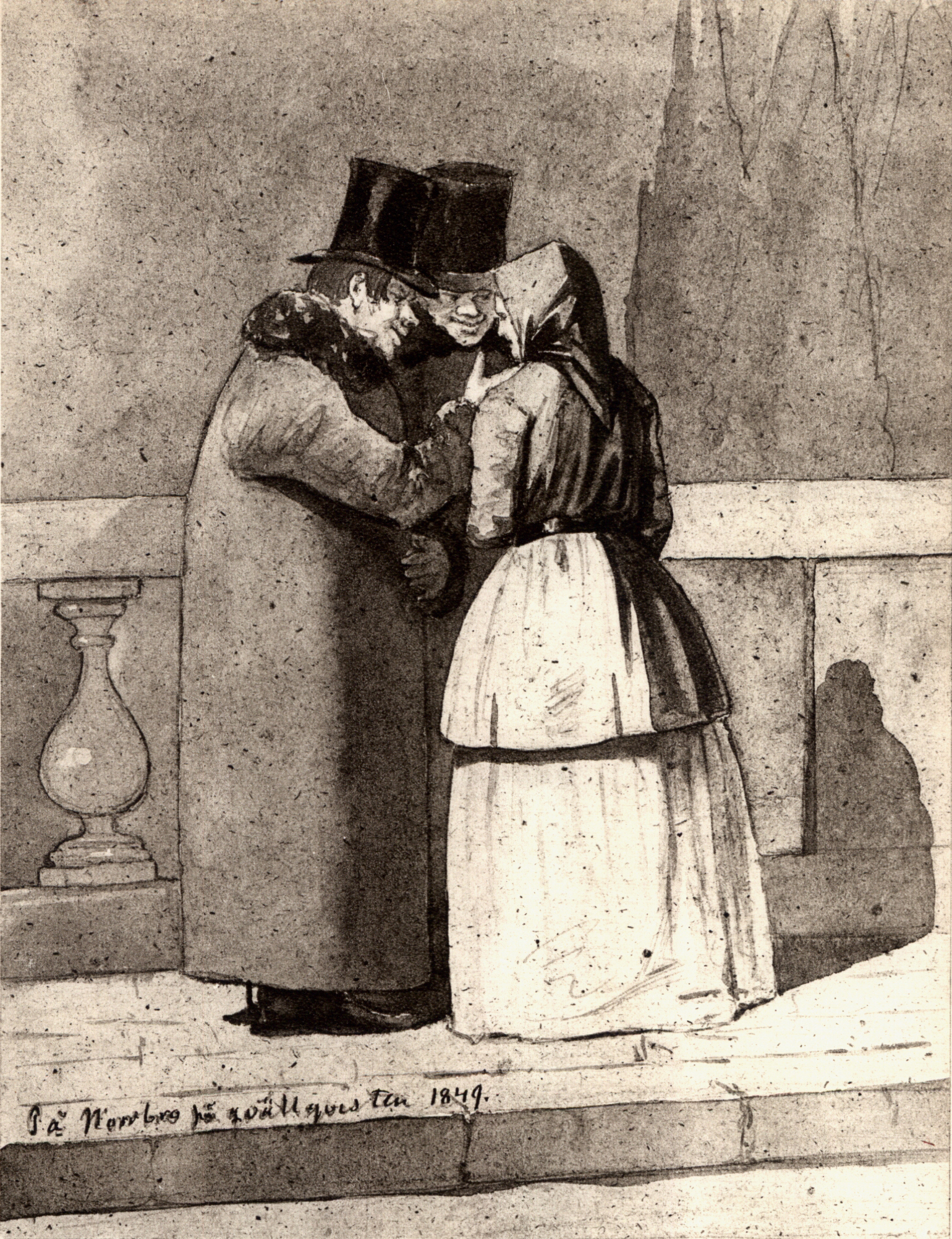 På Norrbro på qvällsqvisten 1849. Lavering i en skissbok av C. J. A. Skogman